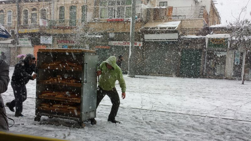 שלג בירושלים - סופת שלגים אחת הגדולות, ב-12 בדצמבר 2013 שני אנשים גוררים עגלת לחם ברחוב יפו